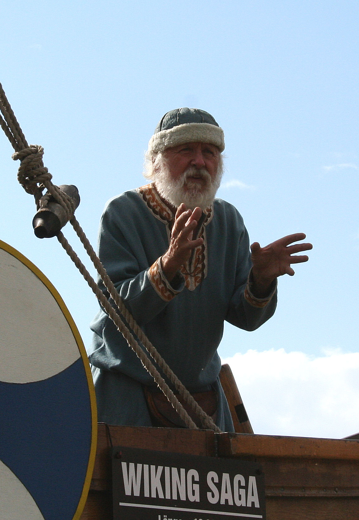 Burghard Pieske im "Slawenland", einer Art Wikingermarkt